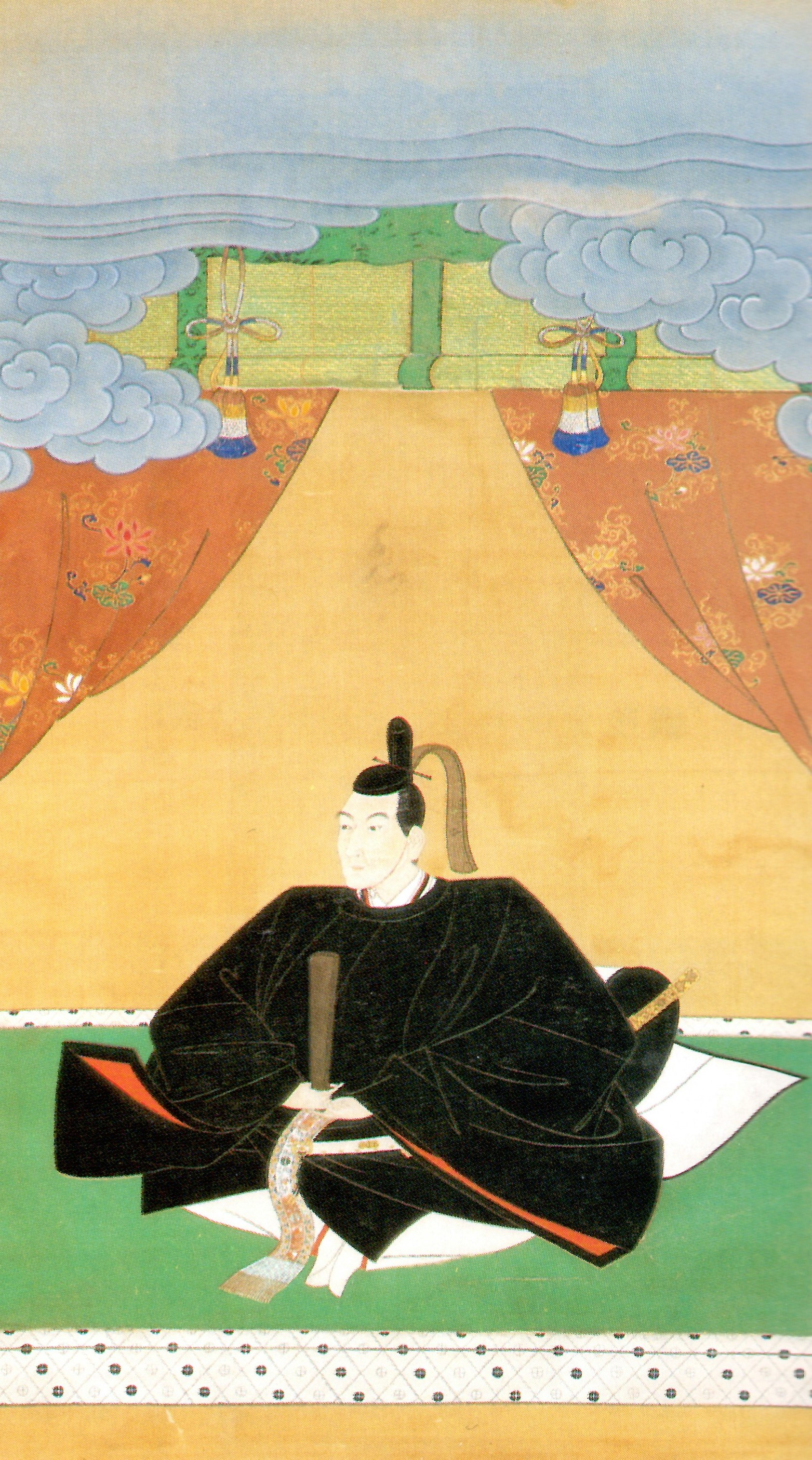 鍋島綱茂の肖像。